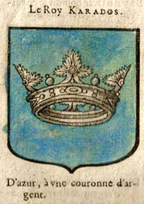 Carados, Hiérome de Bara